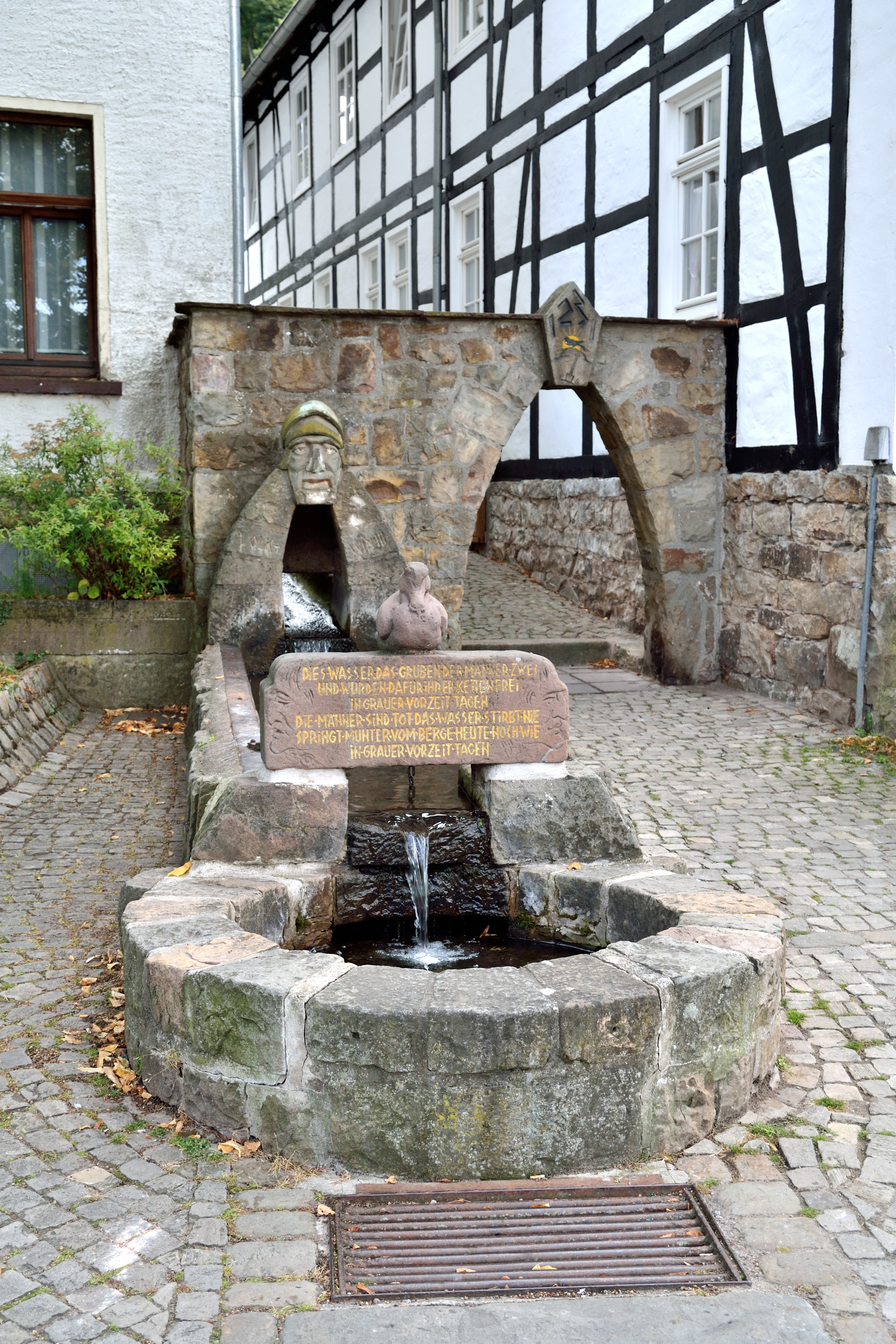 This is a photograph of an architectural monument. Stadtwasser Schwalenberg